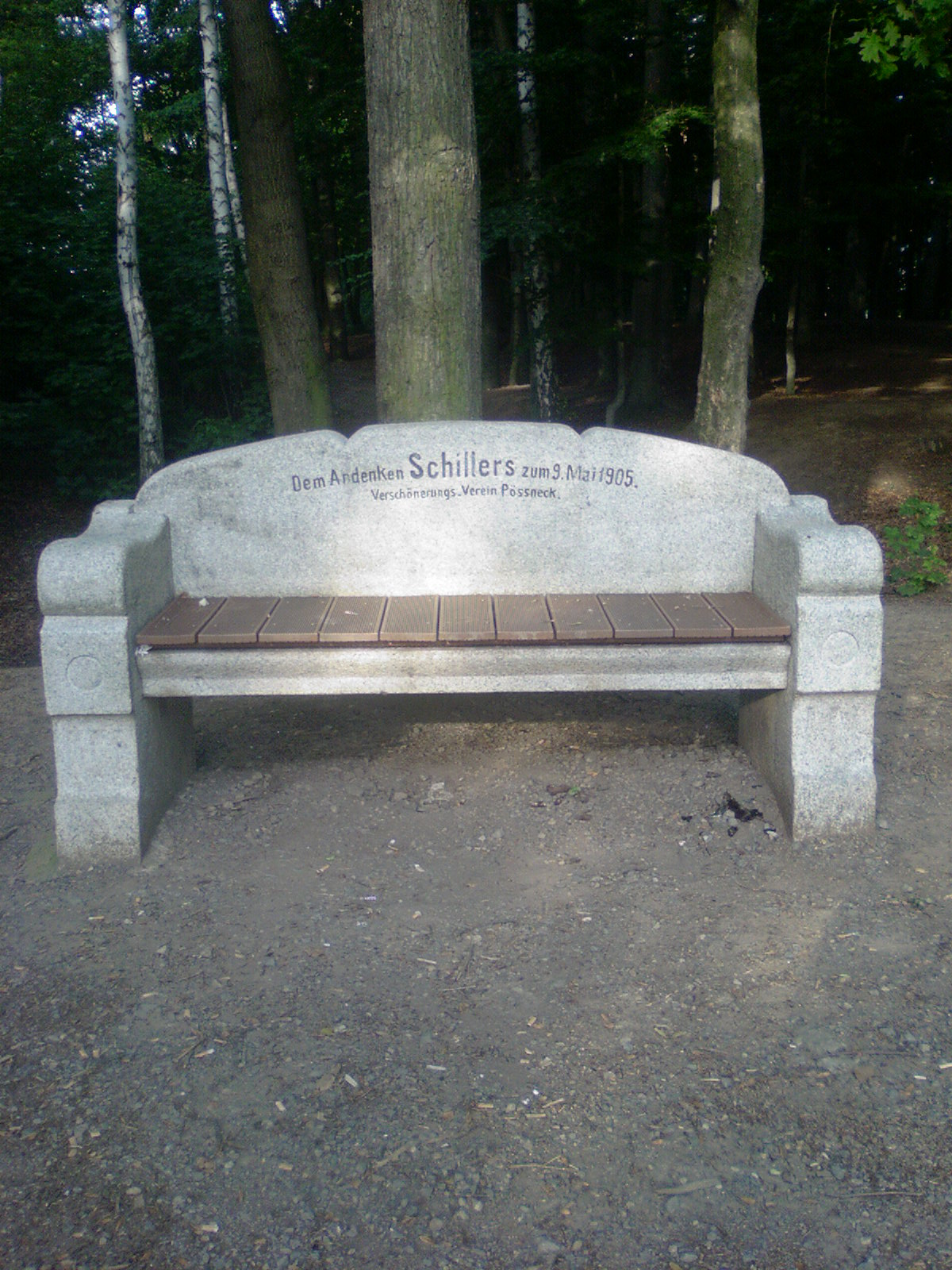 Bank im Waldstück südlich von Pößneck zum Gedenken an Friedrich Schiller 1905